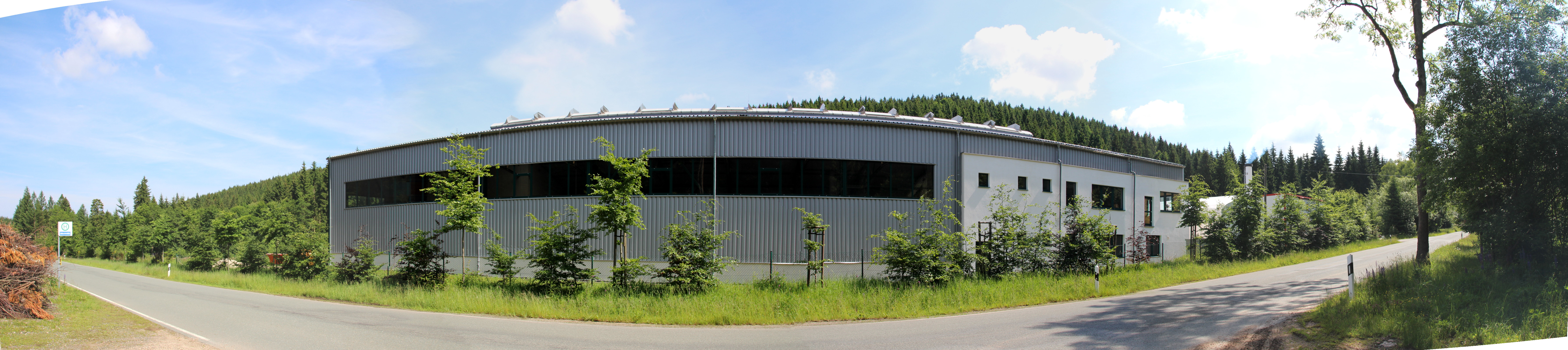 Wilzschmühle (Eibenstock): Eine kleine Siedlung im Tal der Wilzsch in einer Höhe von etwa 675 bis 690 Metern, deren Mittelpunkt im Jahr 2015 einen Anlage zur Produktion von Holzbrennstoffen ist.